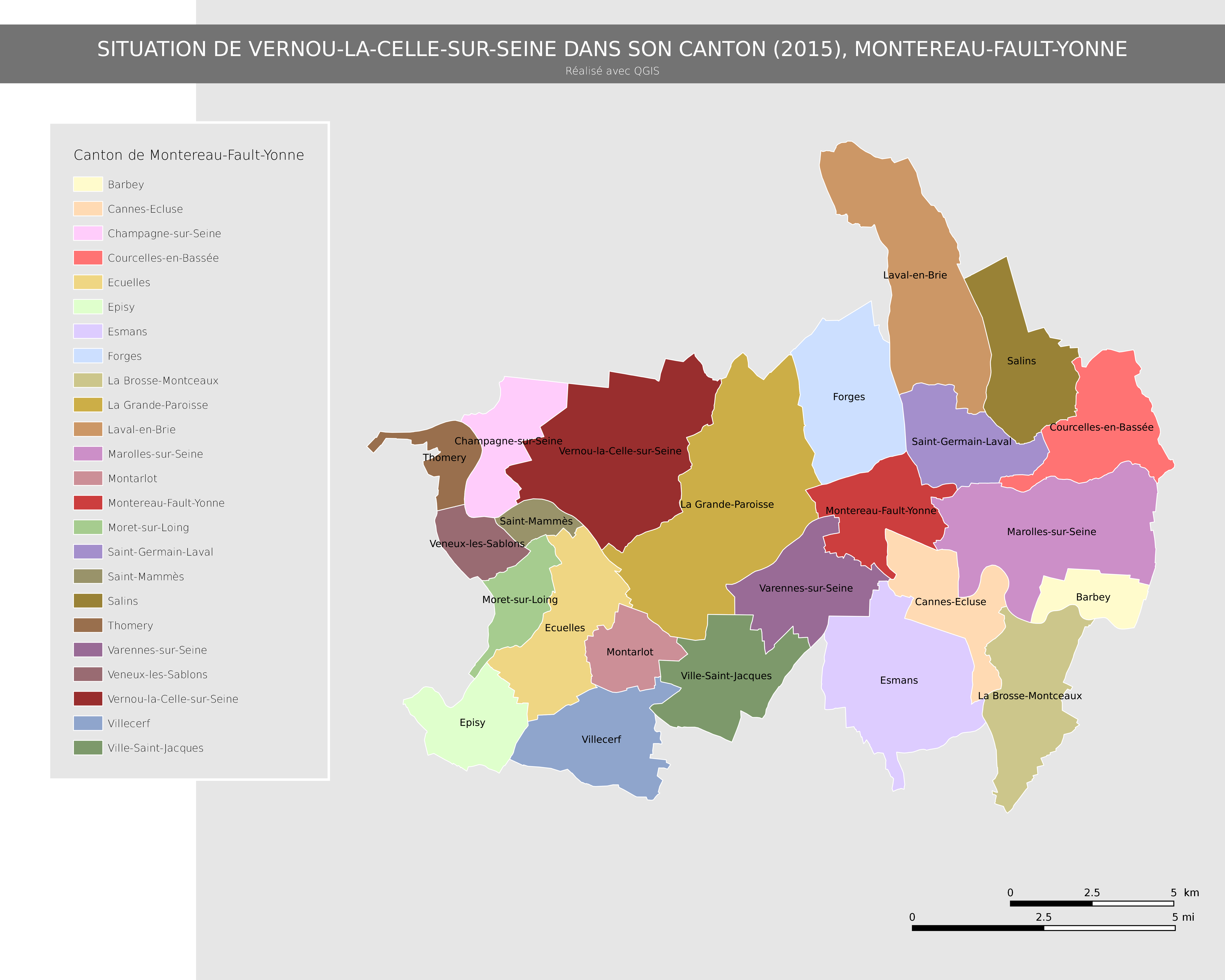 Situation de Vernou-la-Celle-sur-Seine dans son Canton, Montereau-Fault-Yonne